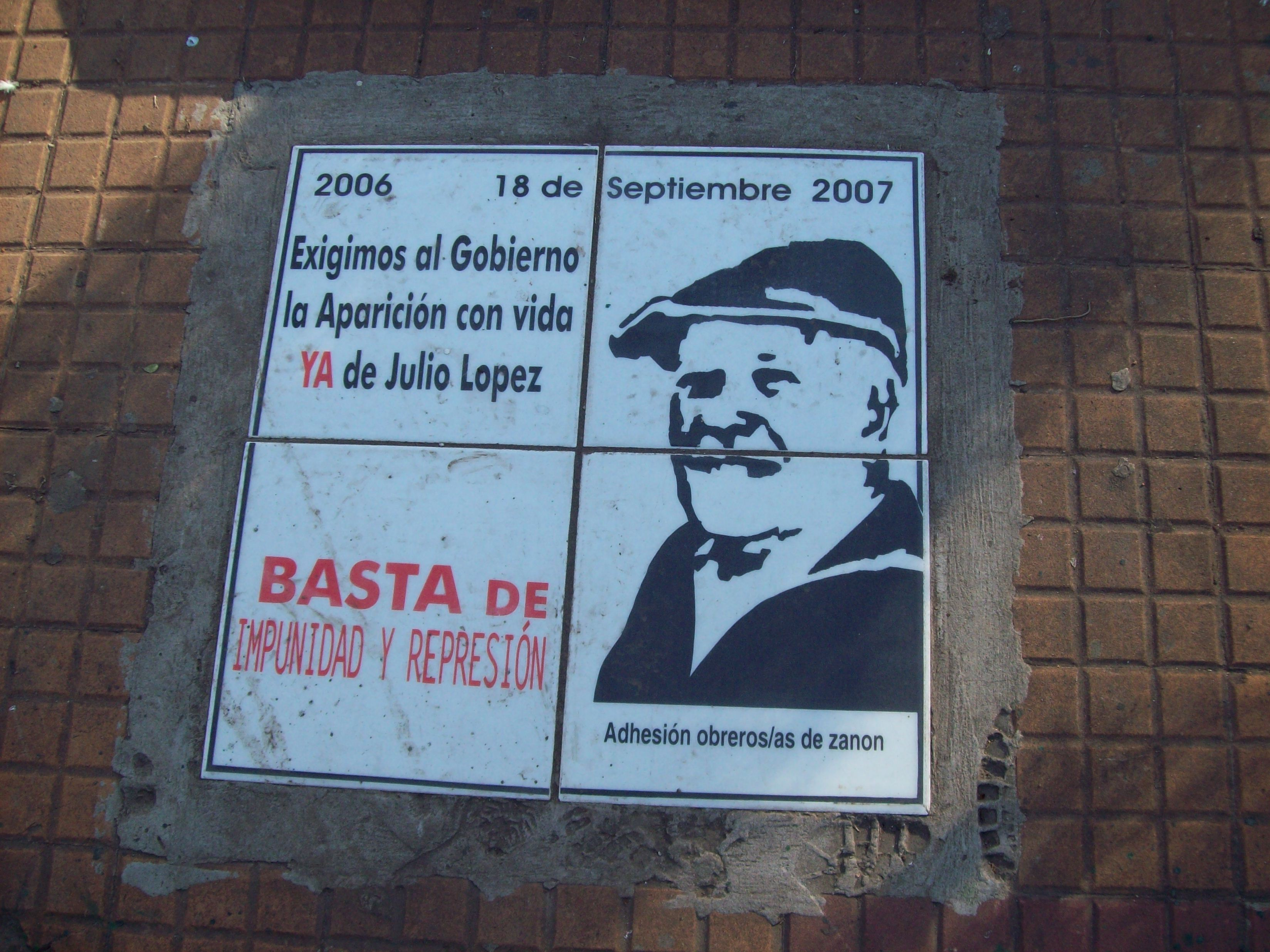 Placa de Jorge Julio Lopéz en la Pirámide de Mayo.